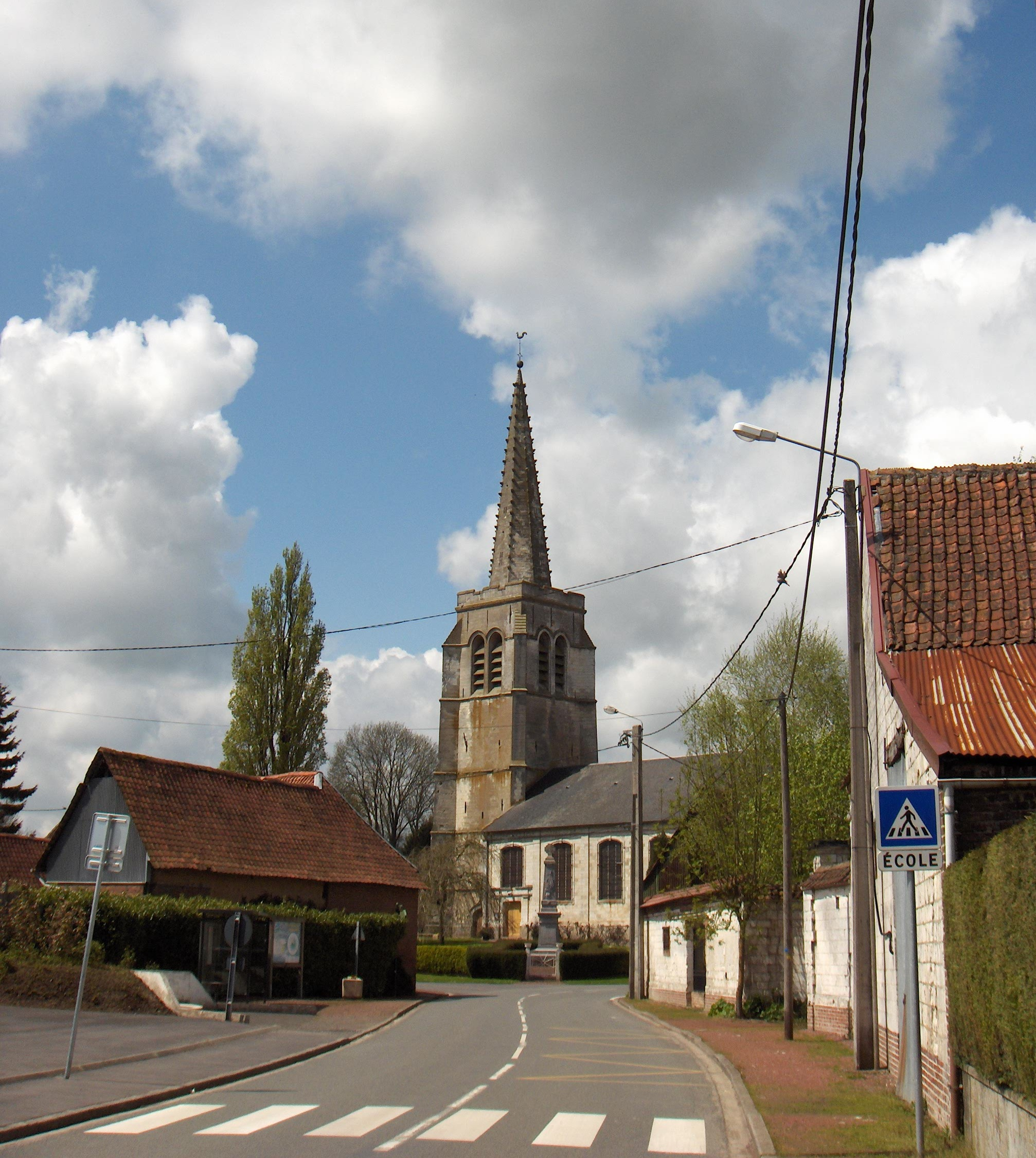 Pommier (dépt. Pas-de-Calais, France), église Saint-Martin (clocher de 1548)